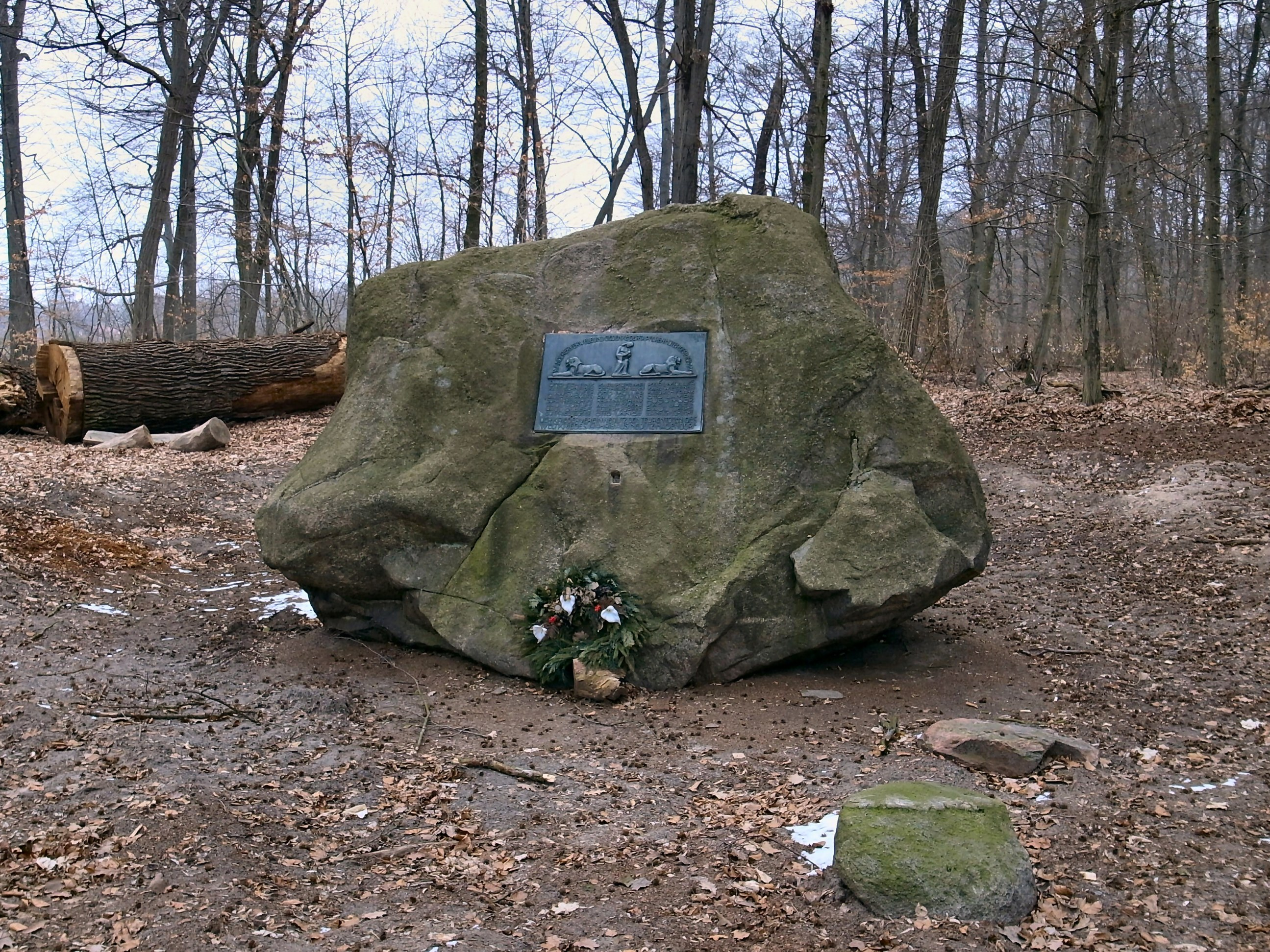 Findling, Teufelsstein von Nedlitz mit Gedenktafel der Gefallenen im ersten Weltkrieg aus Nedlitz und Hagendorf